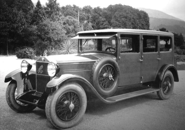 Martini Six, Weymann-style Pullman 1927